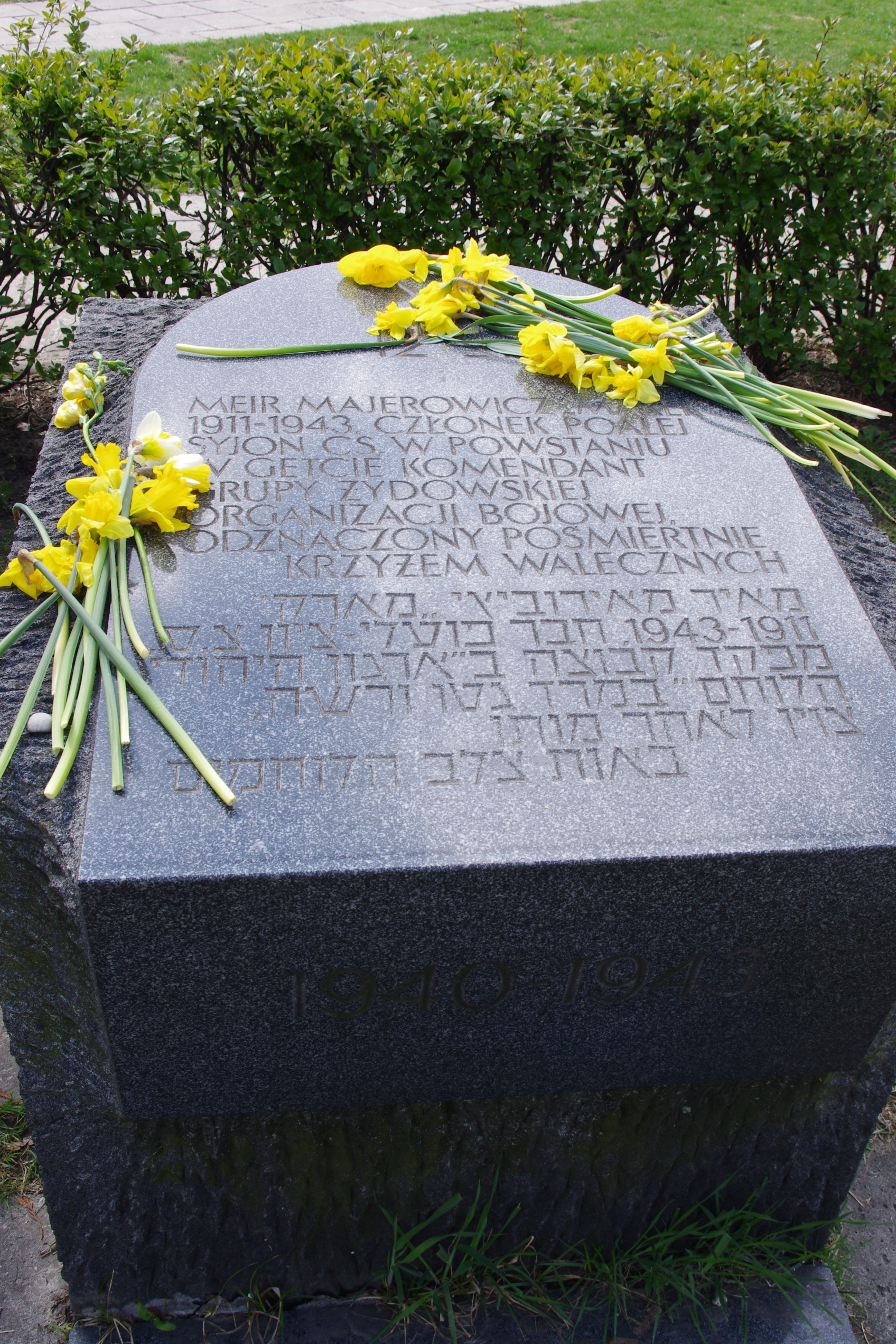 Kamień upamiętniający Meira Majerowicza na ul. Zamenhofa w Warszawie